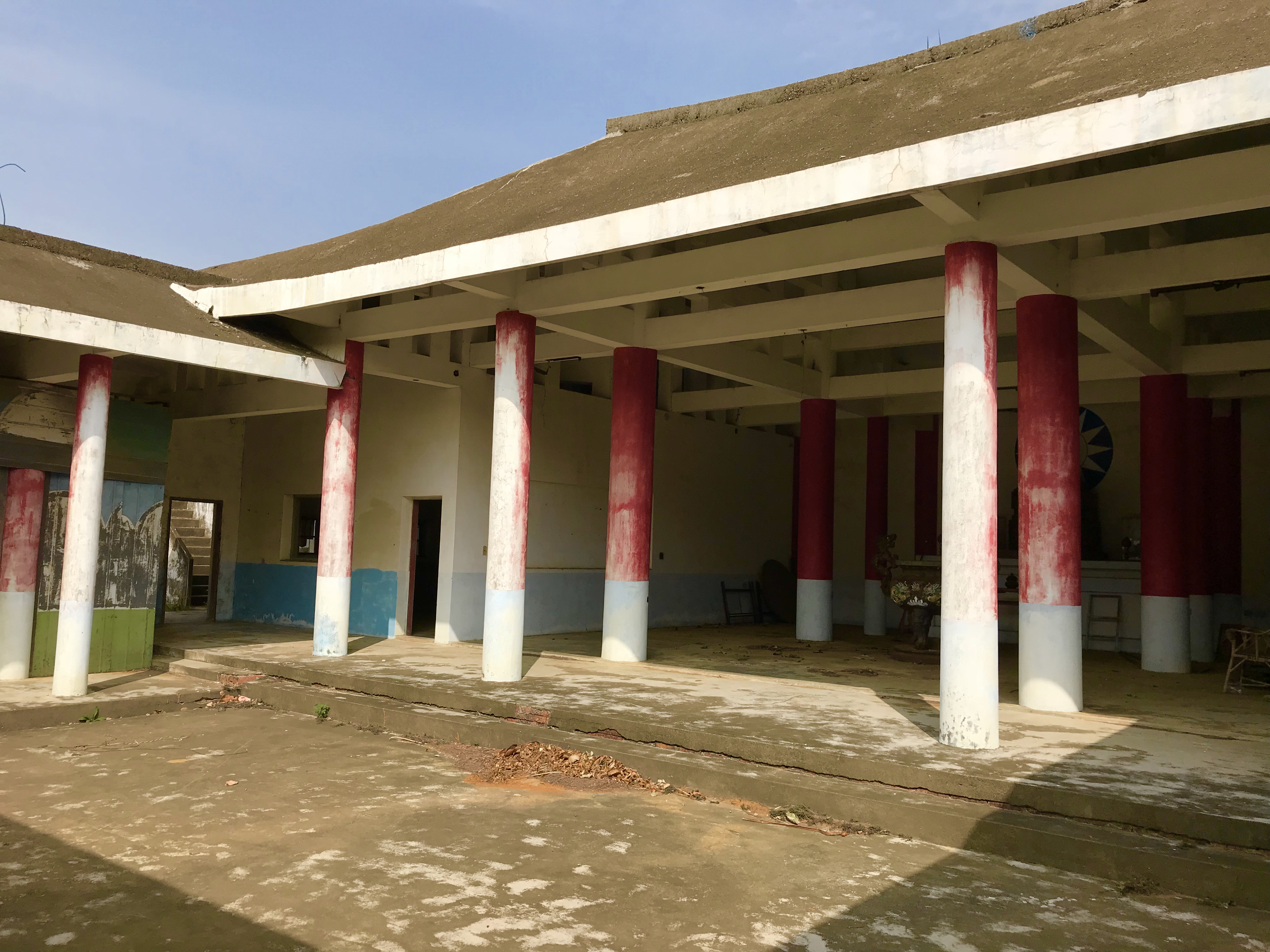 中文（台灣）: 後龍中正紀念堂後殿